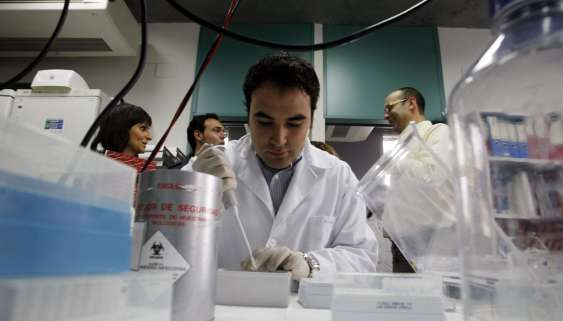 Laboratorio en el que se investiga sobre la detección del cáncer hereditario (IBGM, Valladolid)